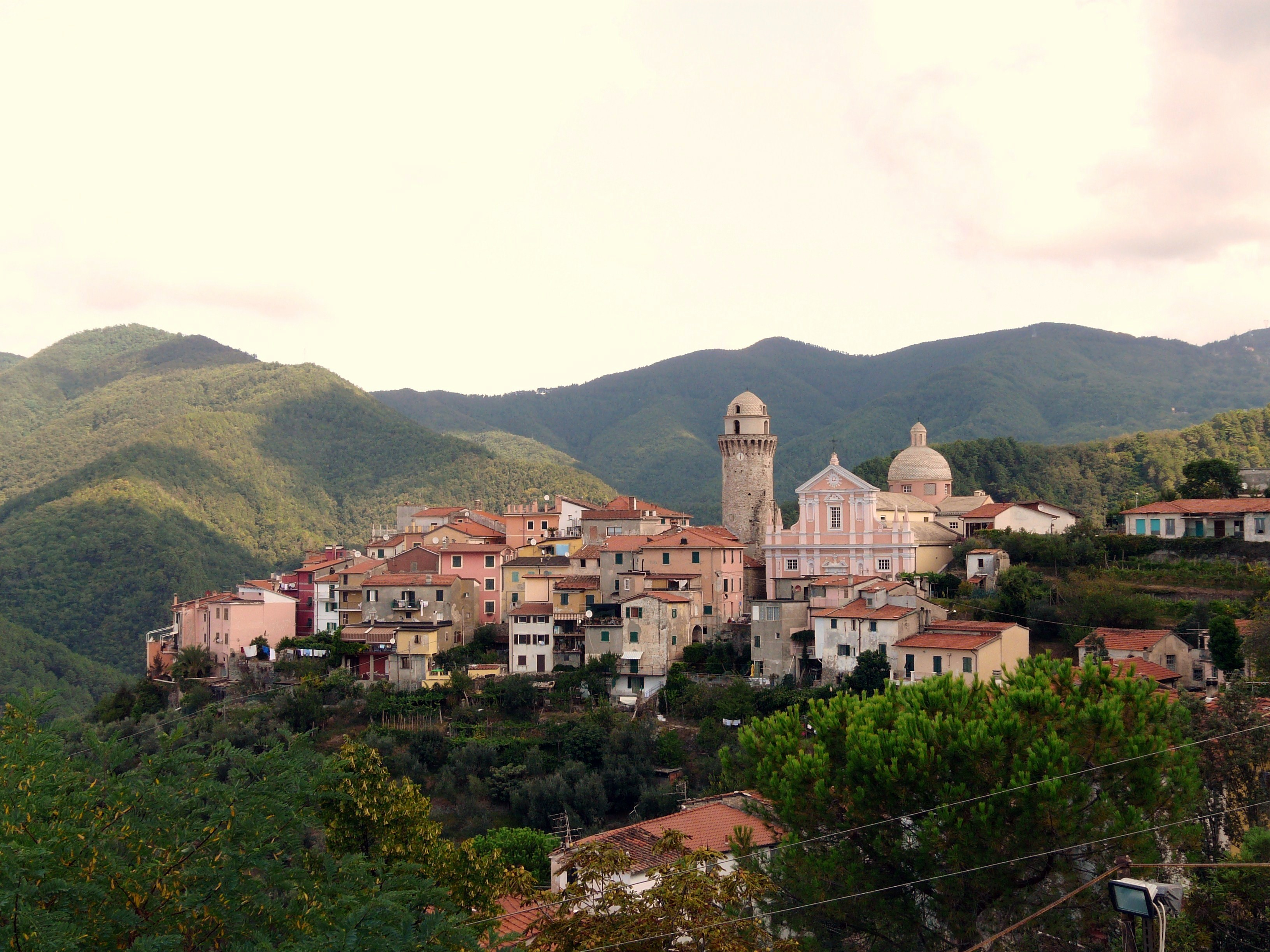 Ortonovo, Liguria, Italia